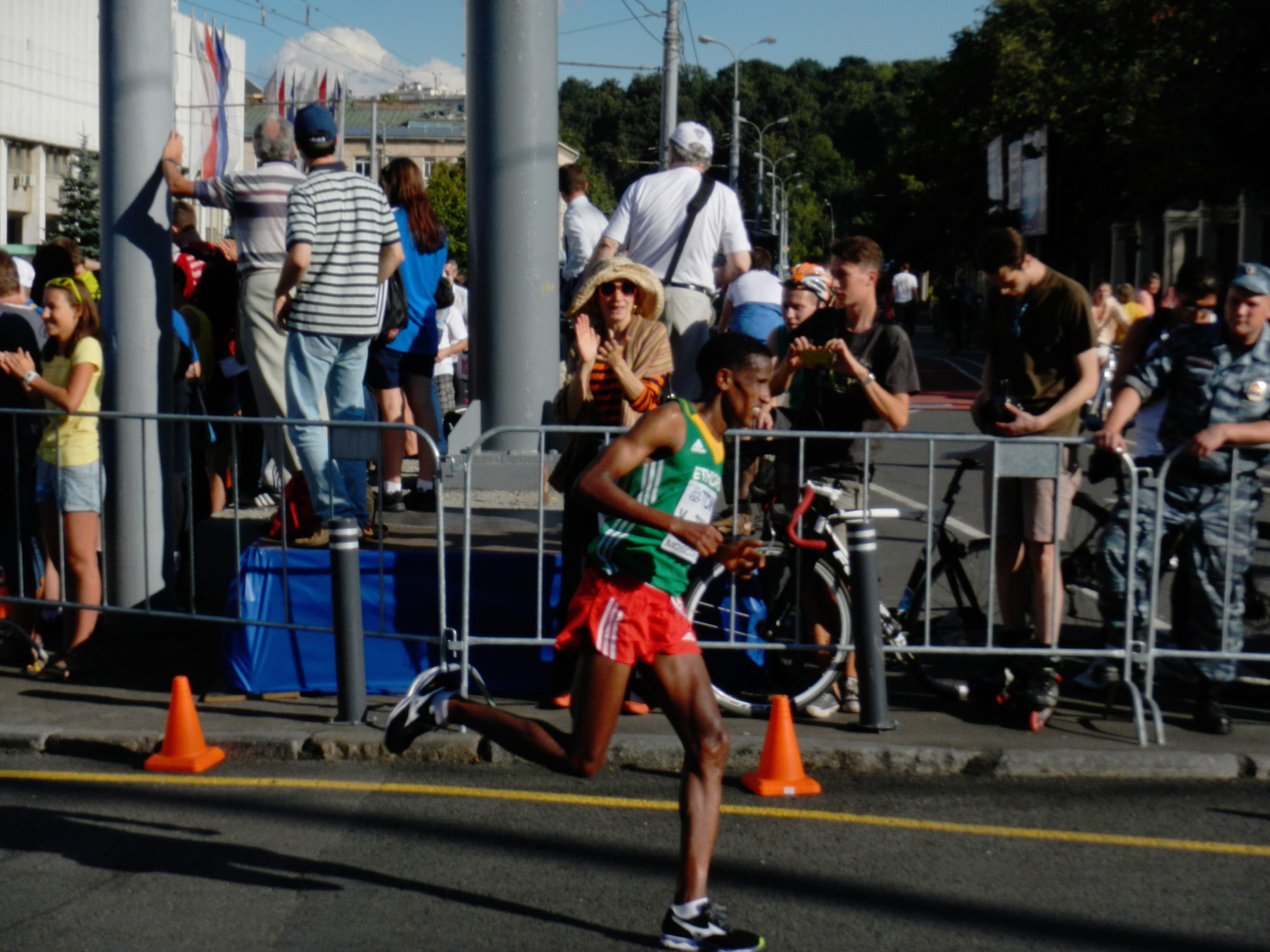 8 (431) Yemane Tsegay (Ethiopia) 2:11:43